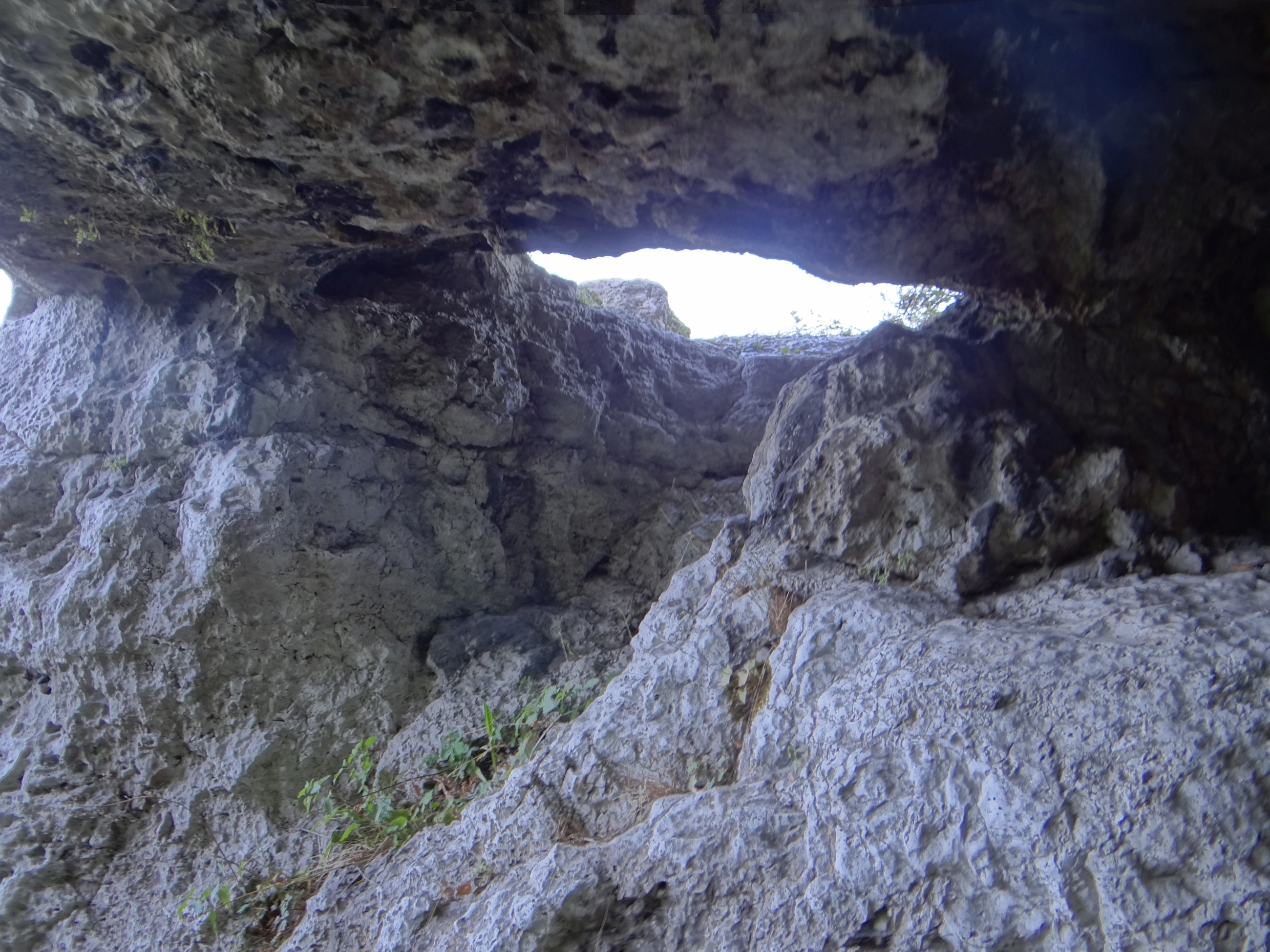 Schronisko na Półce w Igle